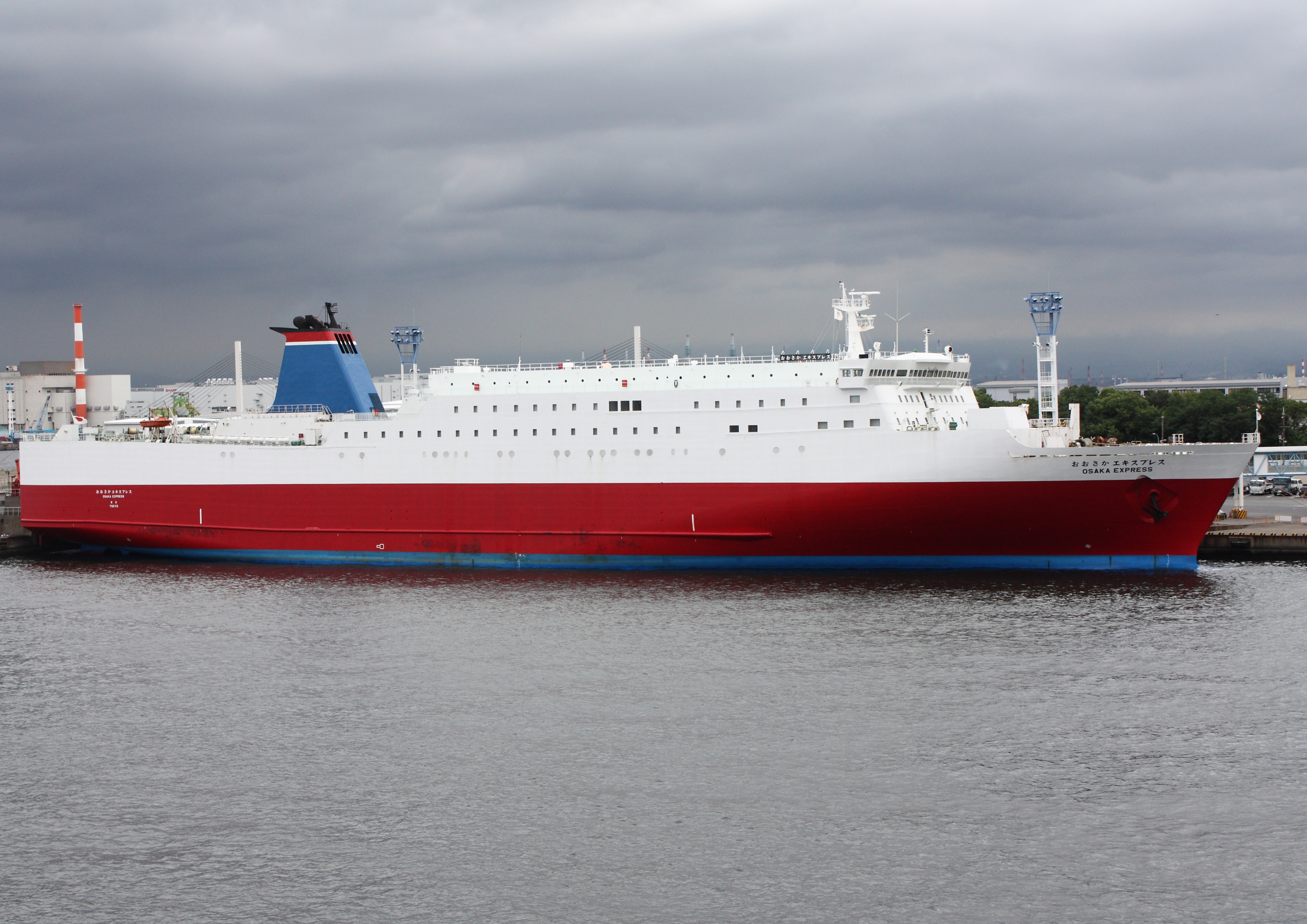 大阪南港かもめフェリーターミナル